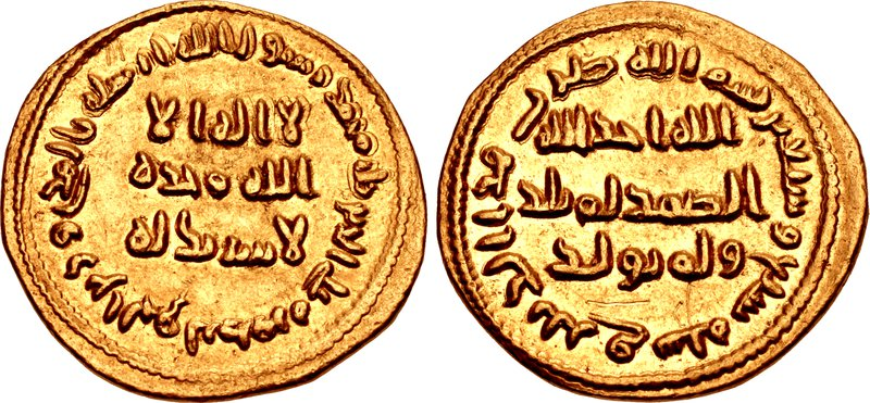 Dinar do califa omíada Abdal Malique cunhado em 696/697